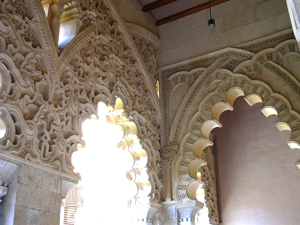 Description: Arquería pórtico sur del Palacio de La Aljafería de Zaragoza (siglo XI) Author: User:Ecelan, retouched by User:Escarlati Original version at Image:La Aljafería - Palacio taifa - Detalle 05.JPG